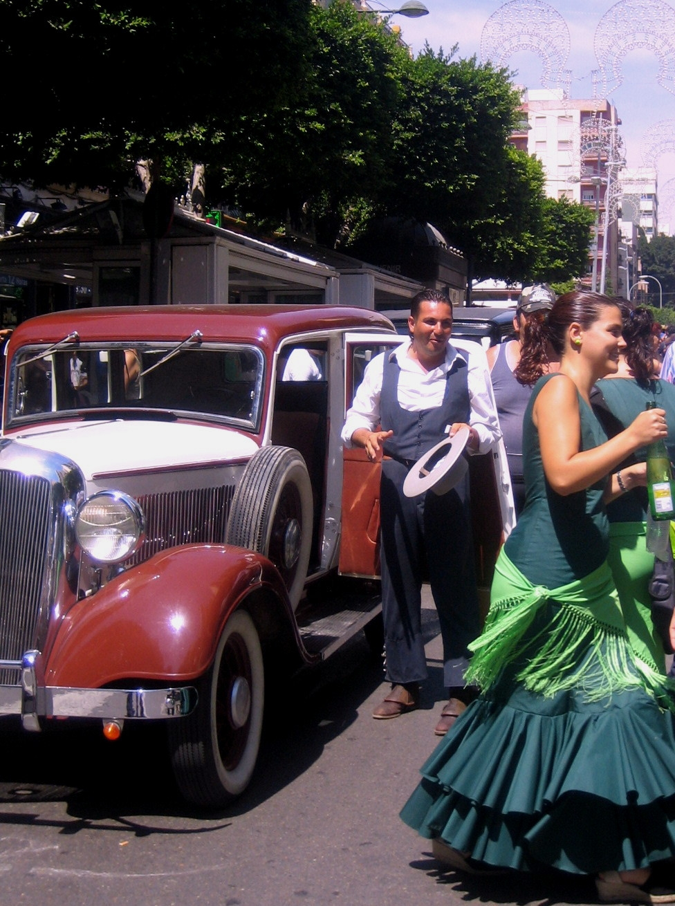 Fería del Mediodía en Almería (España)